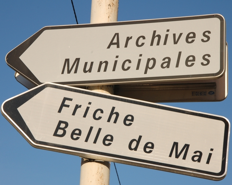 Les Archives Municipales de la ville de Marseille se trouvent dans les locaux de l'ancienne Manufacture de Tabac qui a fermé ses portes en 1990.